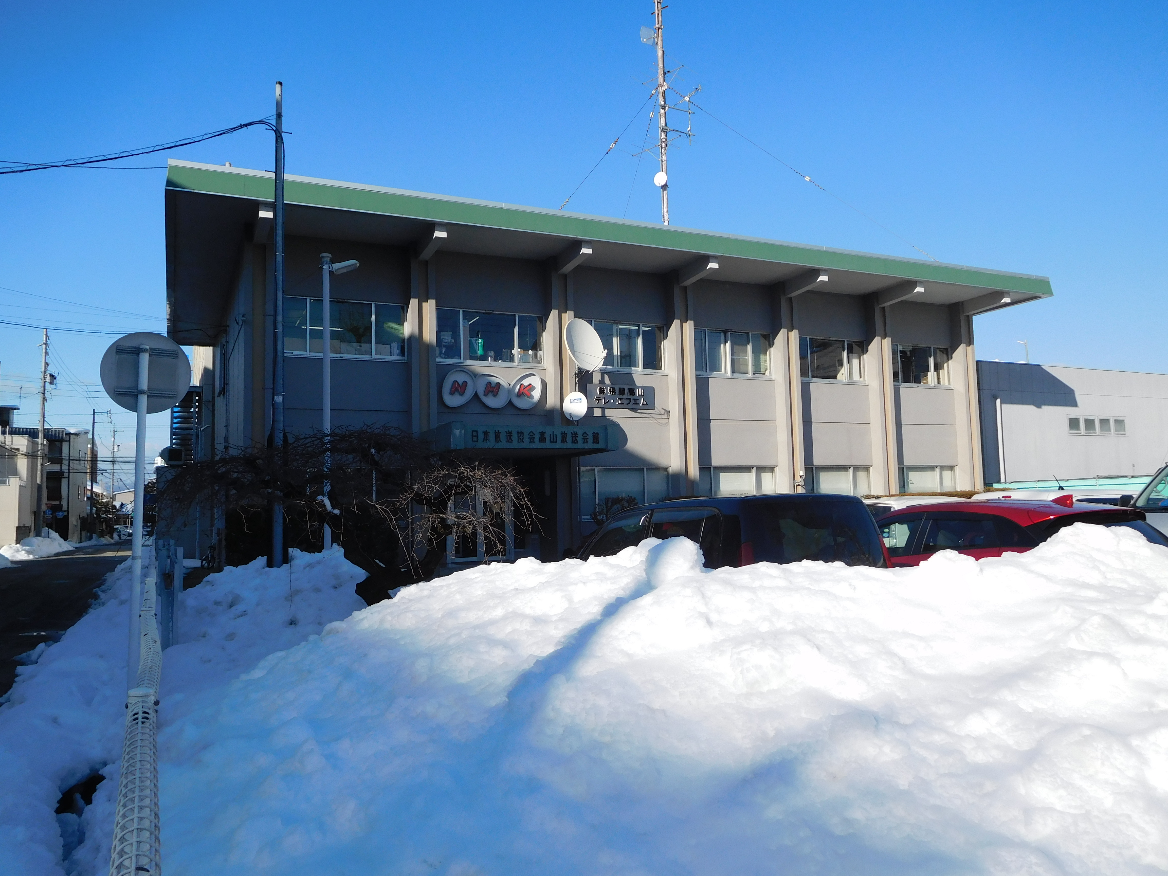 岐阜県高山市名田町五丁目にある、NHK高山放送会館および飛騨高山テレエフエム本社。